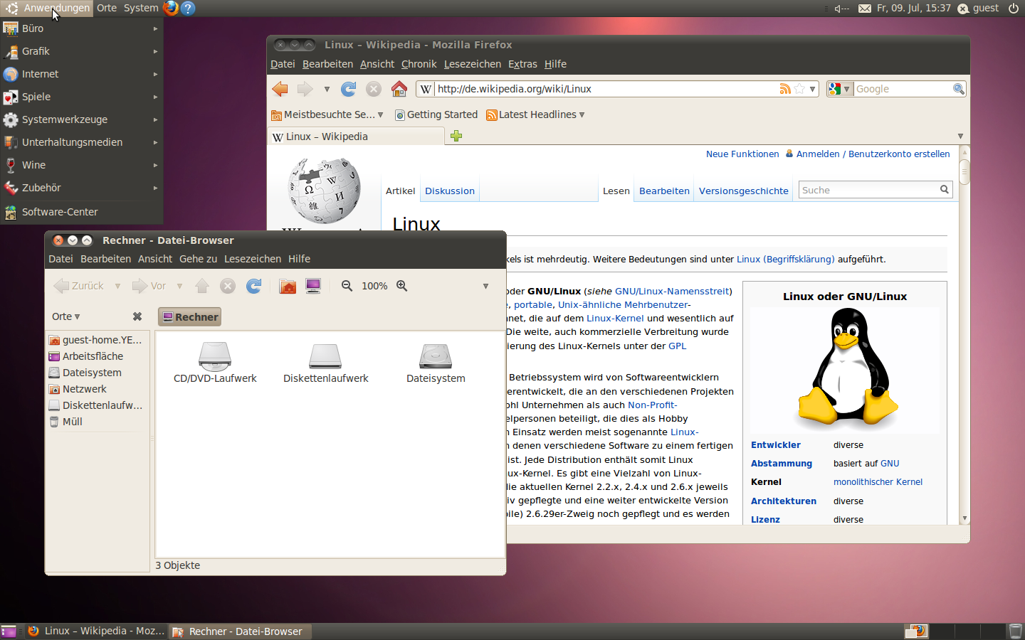 GNOME Desktop unter Ubuntu 10.04 in Standardeinstellung (Gastsitzung); Firefox, Nautilus und Hauptmenü geöffnet